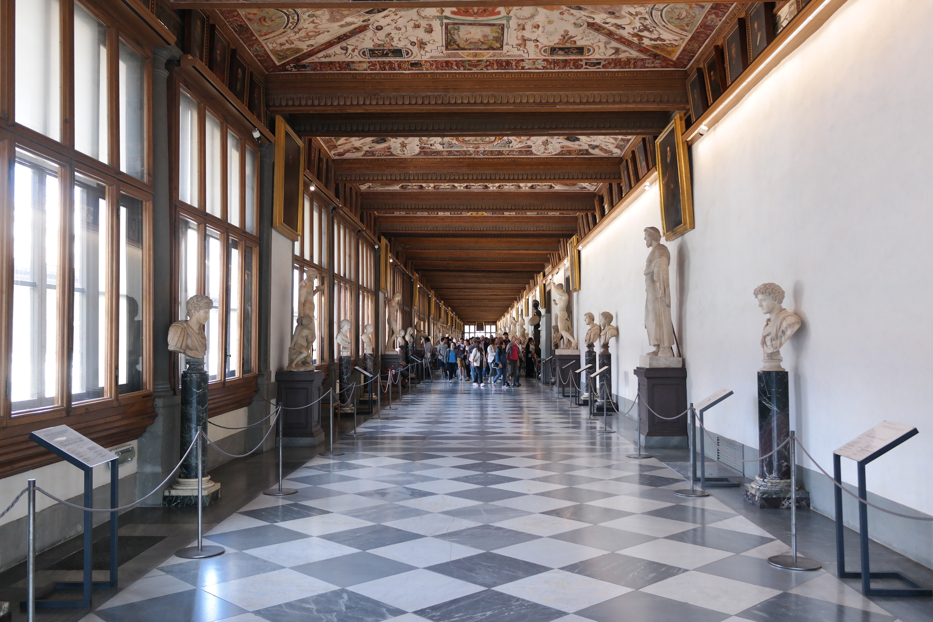 Corridoio superiore est della Galleria degli Uffizi a Firenze